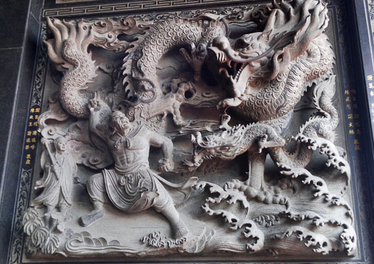 En este escultura vemos a un muchado (Nezha) luchando ferozmente en una dura contienda contra el Dios Dragón Ao Guang.